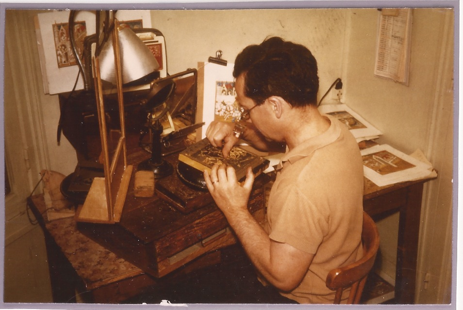 Le graveur sur bois au travail